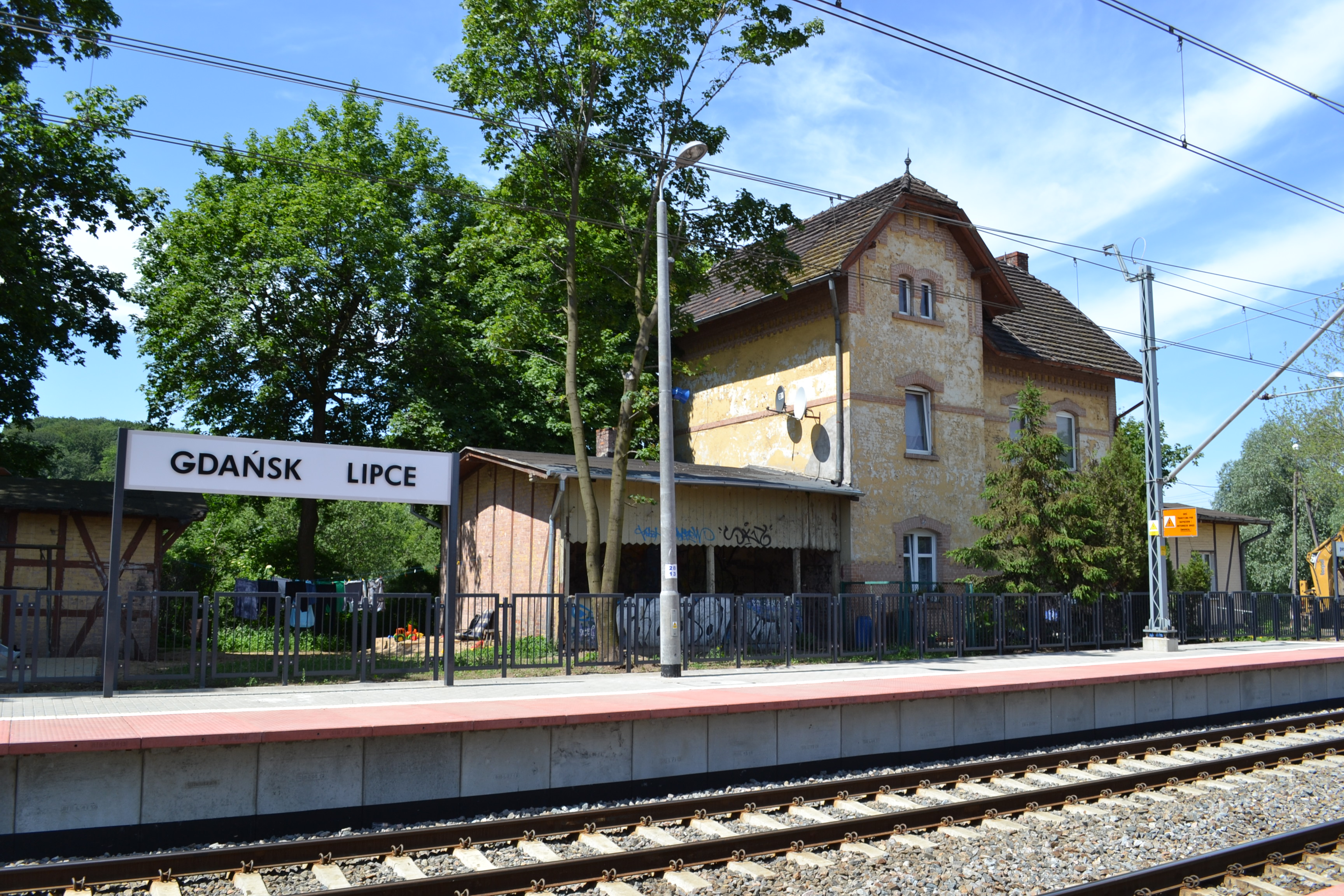 budynek dworca w Gdańsku Lipcach